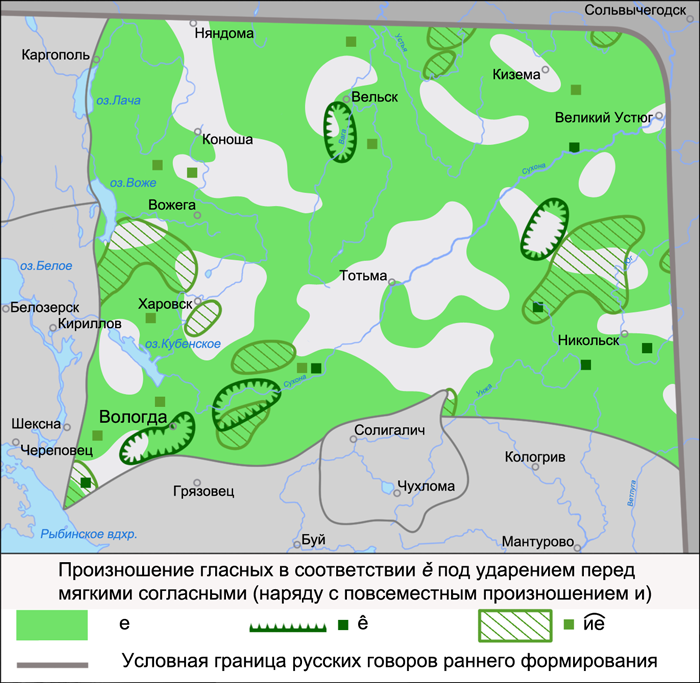 Карта произношения гласных в соответствии ě перед мягкими согласными в вологодских говорах. Источники: Захарова К. Ф., Орлова В. Г., Сологуб А. И., Строганова Т. Ю. Образование севернорусского наречия и среднерусских говоров / Ответственный редактор В. Г. Орлова. — М.: «Наука», 1970. — С. 257 (Карта 70. Произношение ударенных гласных в соответствии ě перед мягкими согласным)